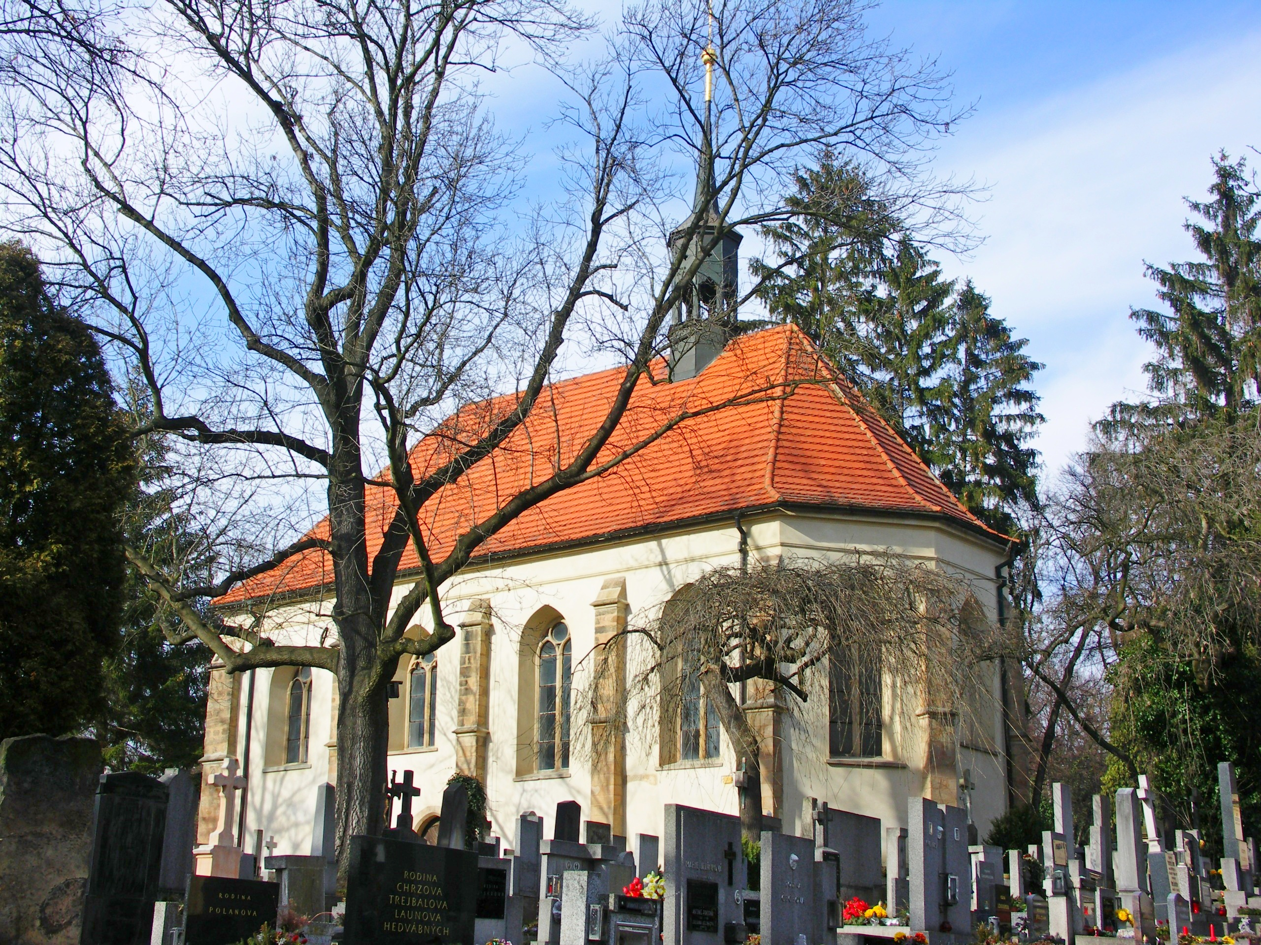 Kostel Nejsvětější Trojice, Rakovník, hřbitov.